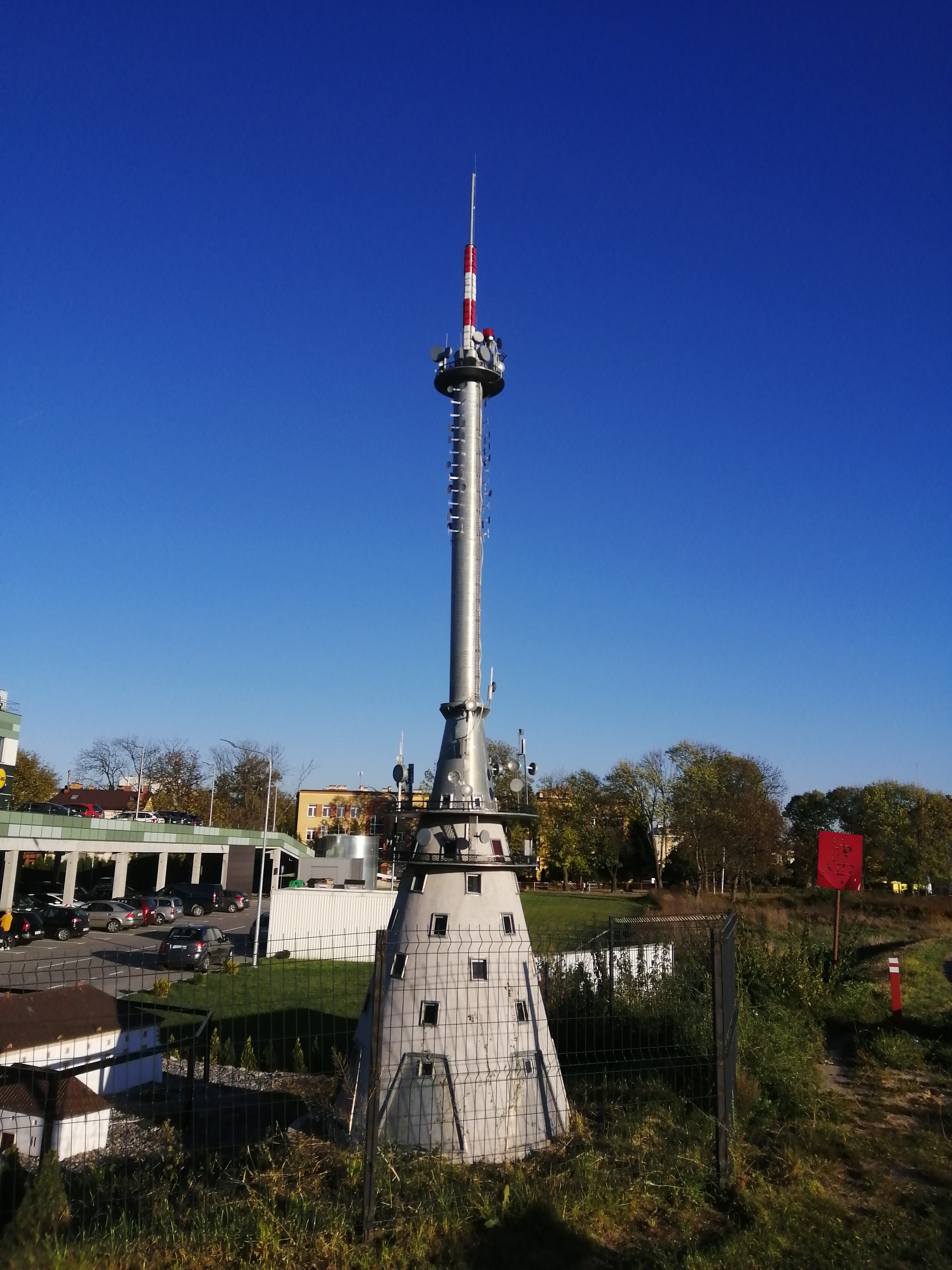 Model RTCN Święty Krzyż zlokalizowany w Ostrowcu Św. przy Galerii Łysica